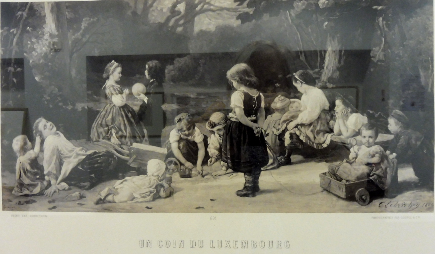 Un coin du Luxembourg, d'après Timoléon Lobrichon, 1866. Photo 1860. Exposition Goupil, bibliothèque Flora Tristan à Bordeaux, été 2017.